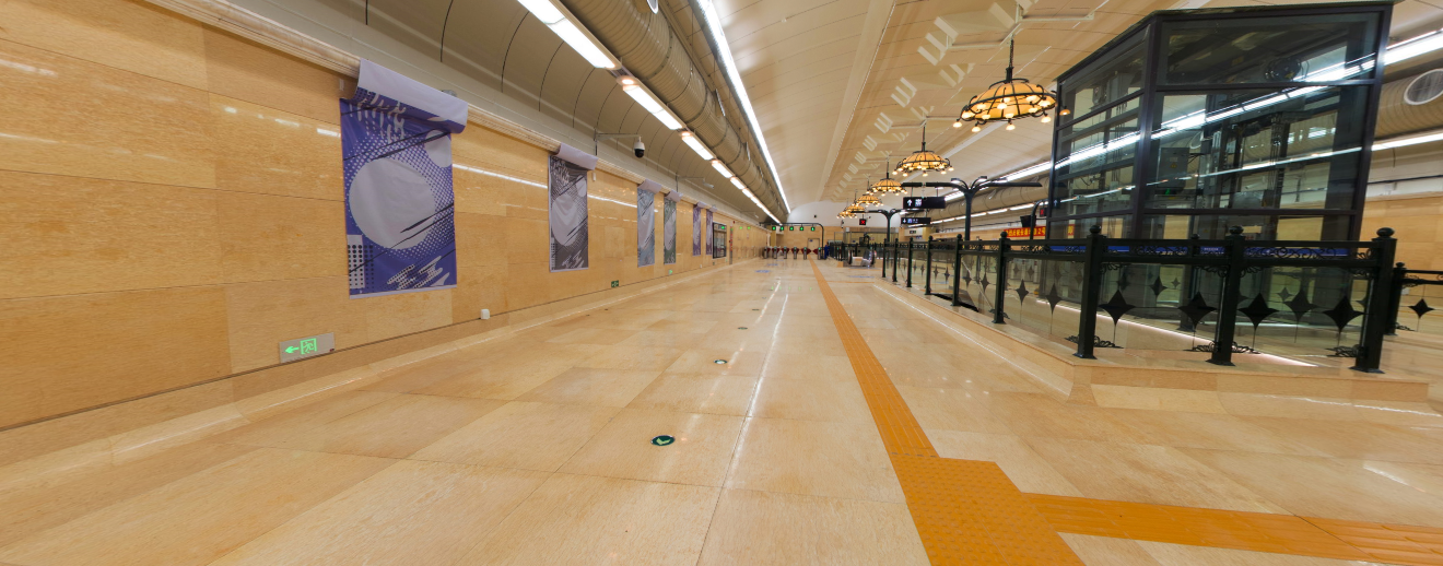 长春地铁2号线建设广场站站厅